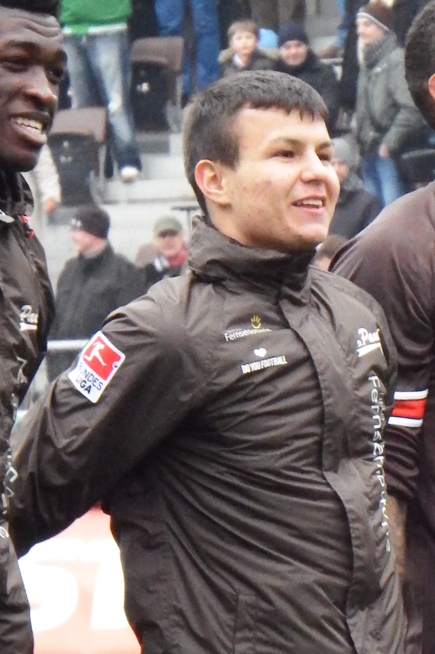 Startsev, Andrej StP